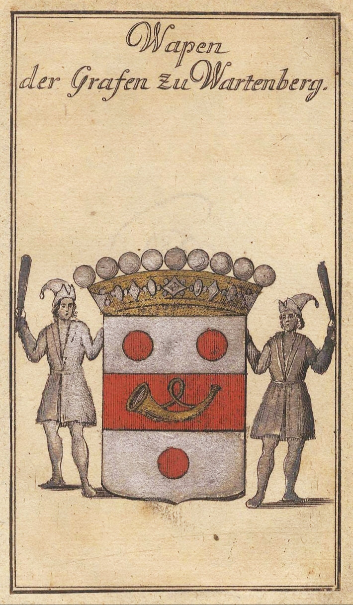 Wappen der Reichsgrafen von Wartenberg (seit 1699) aus dem Hause Kolb von Wartenberg, königlich preußische General-Erbpostmeister (seit 1702; dafür das goldene Jagdhorn (Posthorn) als „Wappenbesserung“)